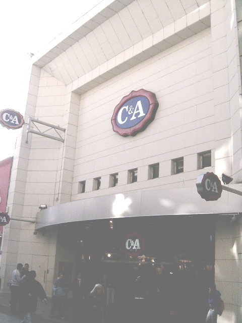 Fachada del ex Cine Radar, en Rosario (Argentina) Luis Antonio Blotta Stengel Propia Cámara digital HP photosmart 635